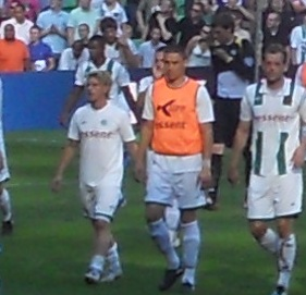 Jonas Ivens bij FC Groningen als wisselspeler in oranje vest.